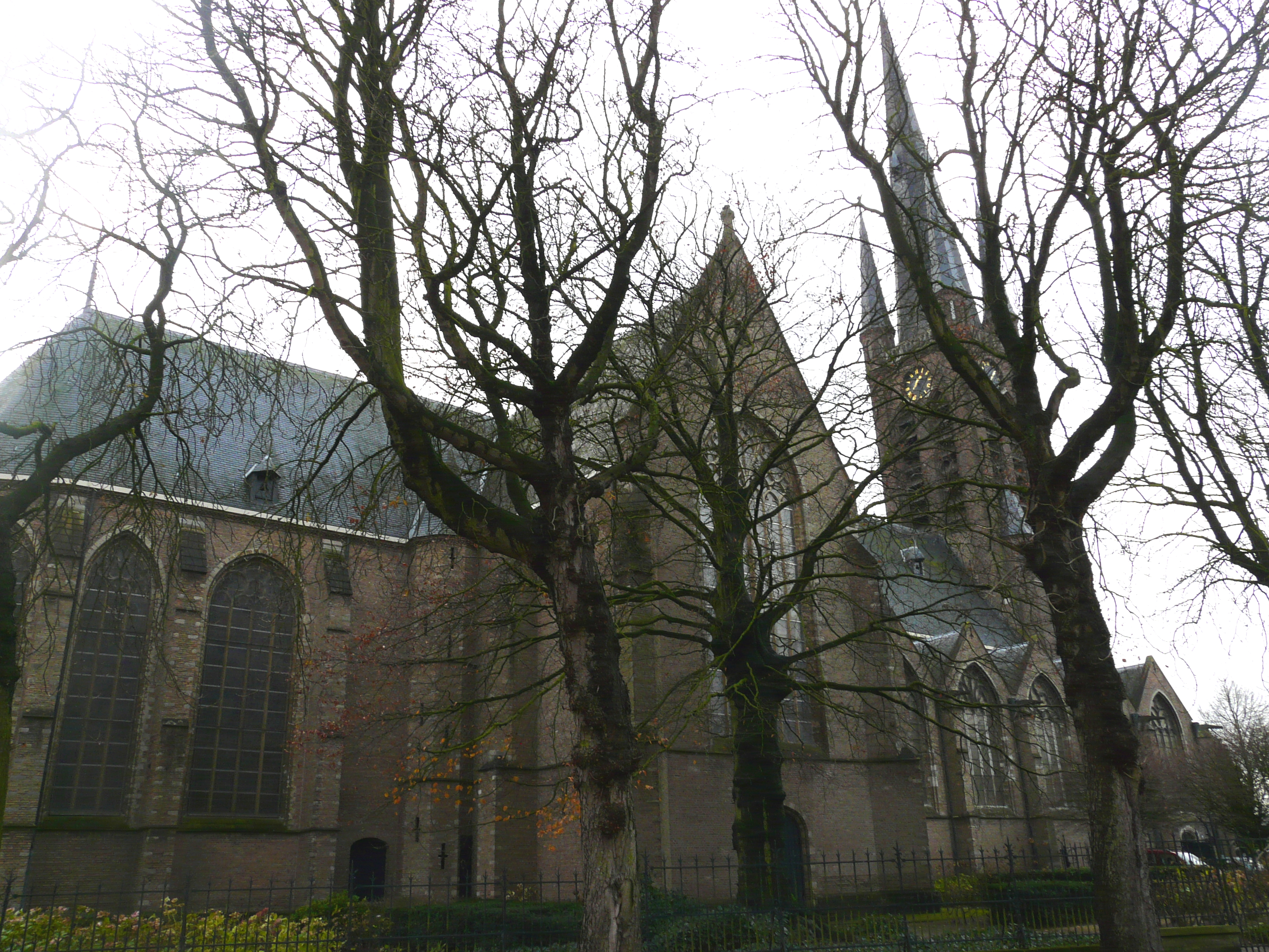 Zicht op een deel van de Sint-Martinuskerk in Princenhage in Breda